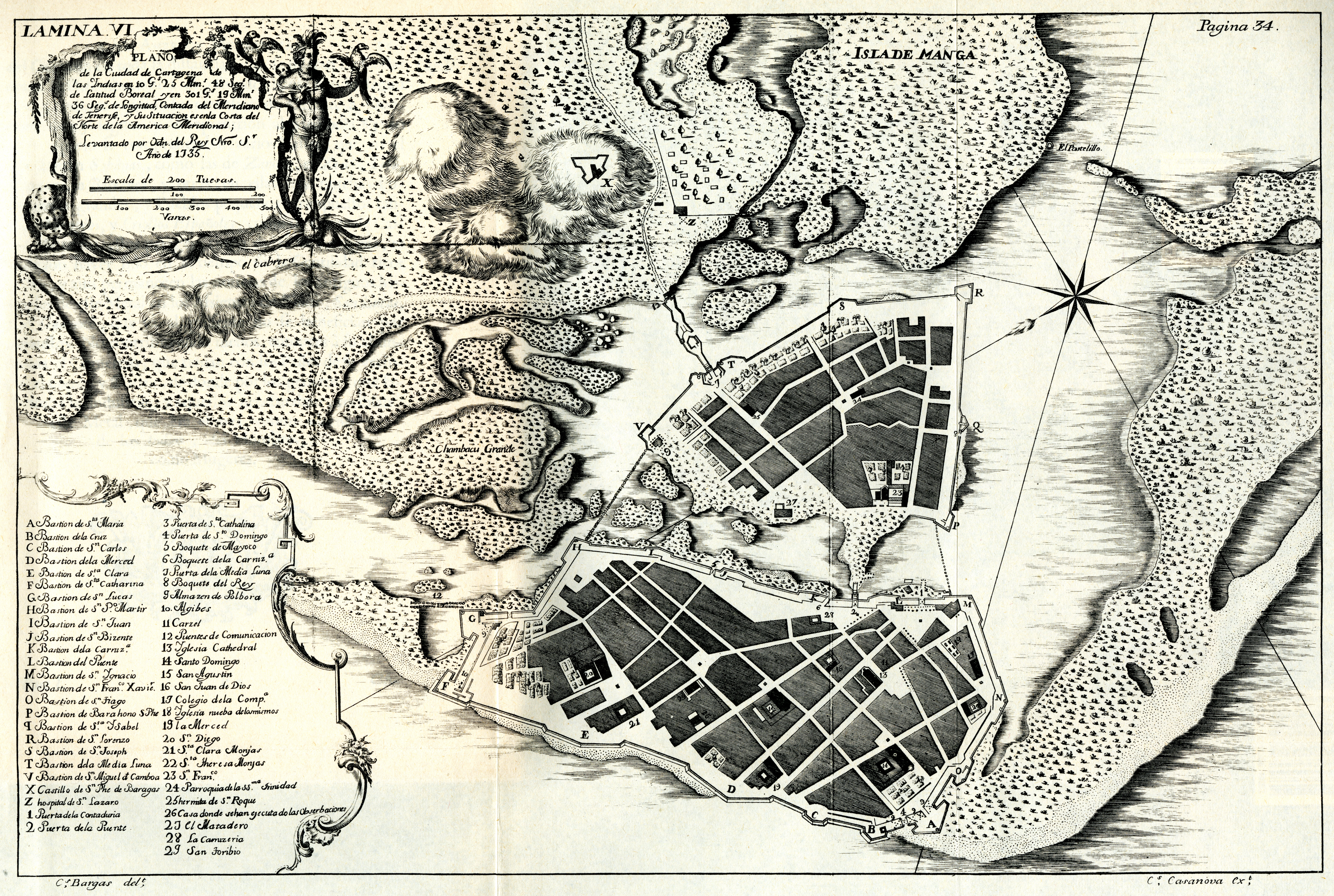 De Ulloa, Antonio y Jorge Juan. Relación Histórica del Viaje a la América Meridional, hecho de Orden de Su Majestad Católica para medir algunos Grados de Meridiano Terrestre, y venir por ellos en conocimiento de la verdadera Figura y Magnitud de la Tierra, con otras varias Observaciones Astronómicas y Físicas. Por Don Jorge Juan Comendador de Aliaga, en la Orden de San Juan, Socio correspondiente de la Real Academia de las Ciencias de París; y Don Antonio de Ulloa de la Real Sociedad de Londres: ambos por Capitanes de Fragata de la Real Armada. Primera Parte / Tomo I. Impresa por la Orden del Rey Nuestro Señor en Madrid por Antonio Marín, Año de MCDDXLVIII (1748). Diapositiva de Consulta y acceso publico cuya información fue investigada de un libro y/o ejemplar de revisión custodiado en los Fondos Bibliográficos (Sección Siglo XVIII o Etapa Colonial) del Archivo Histórico del Guayas; Guayaquil, Ecuador.Consultado y compartido por el usuario J. Javier García A.